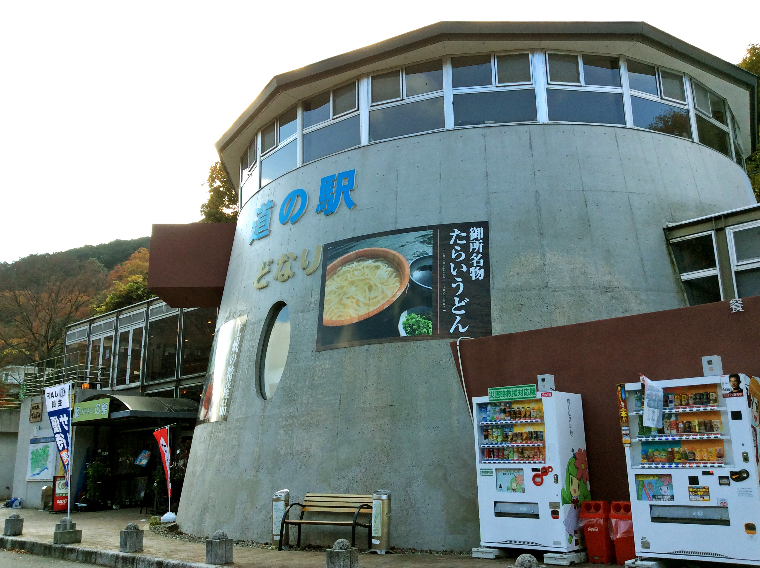 道の駅どなり/外観